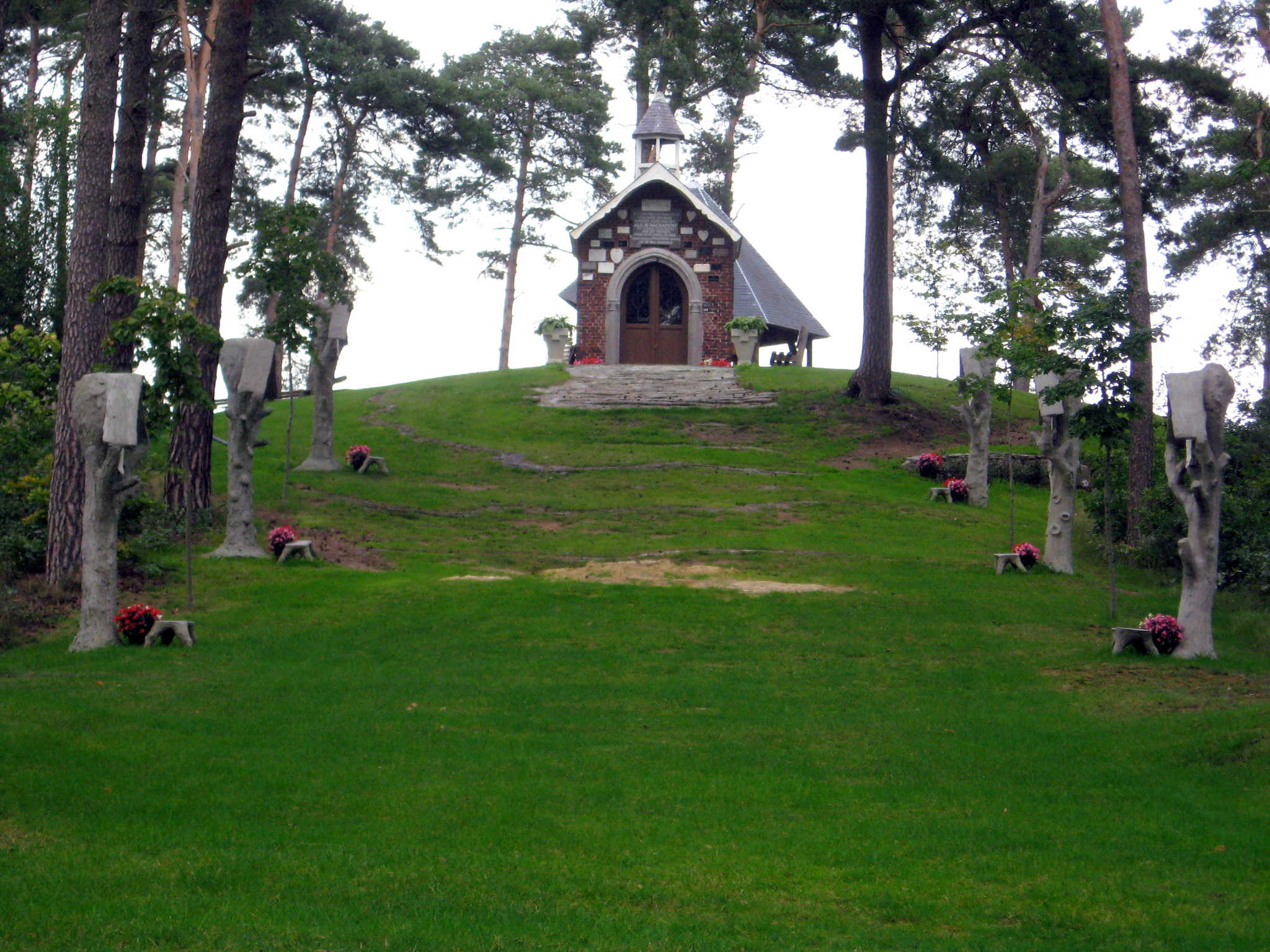 Sacramentskapel in Zolder